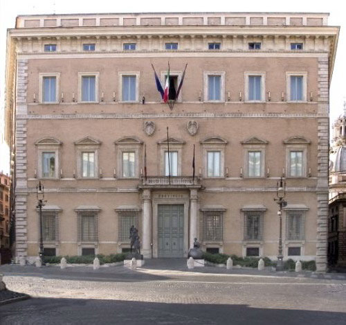 Roma - Palazzo Valentini Licensing Categoria:Provincia di Roma